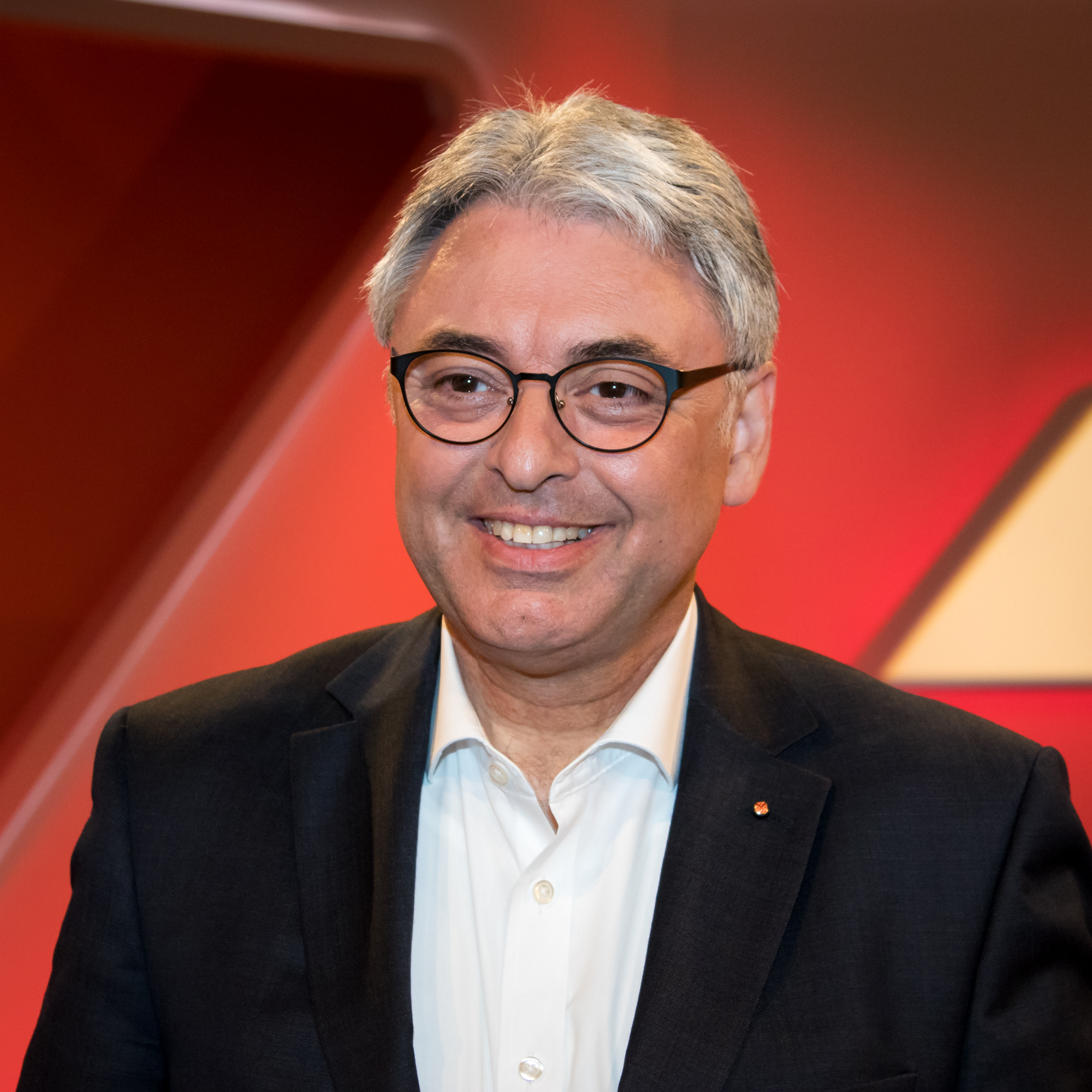 Martin Lohmann in der WDR-Sendung "Maischberger" am 14.6.2017